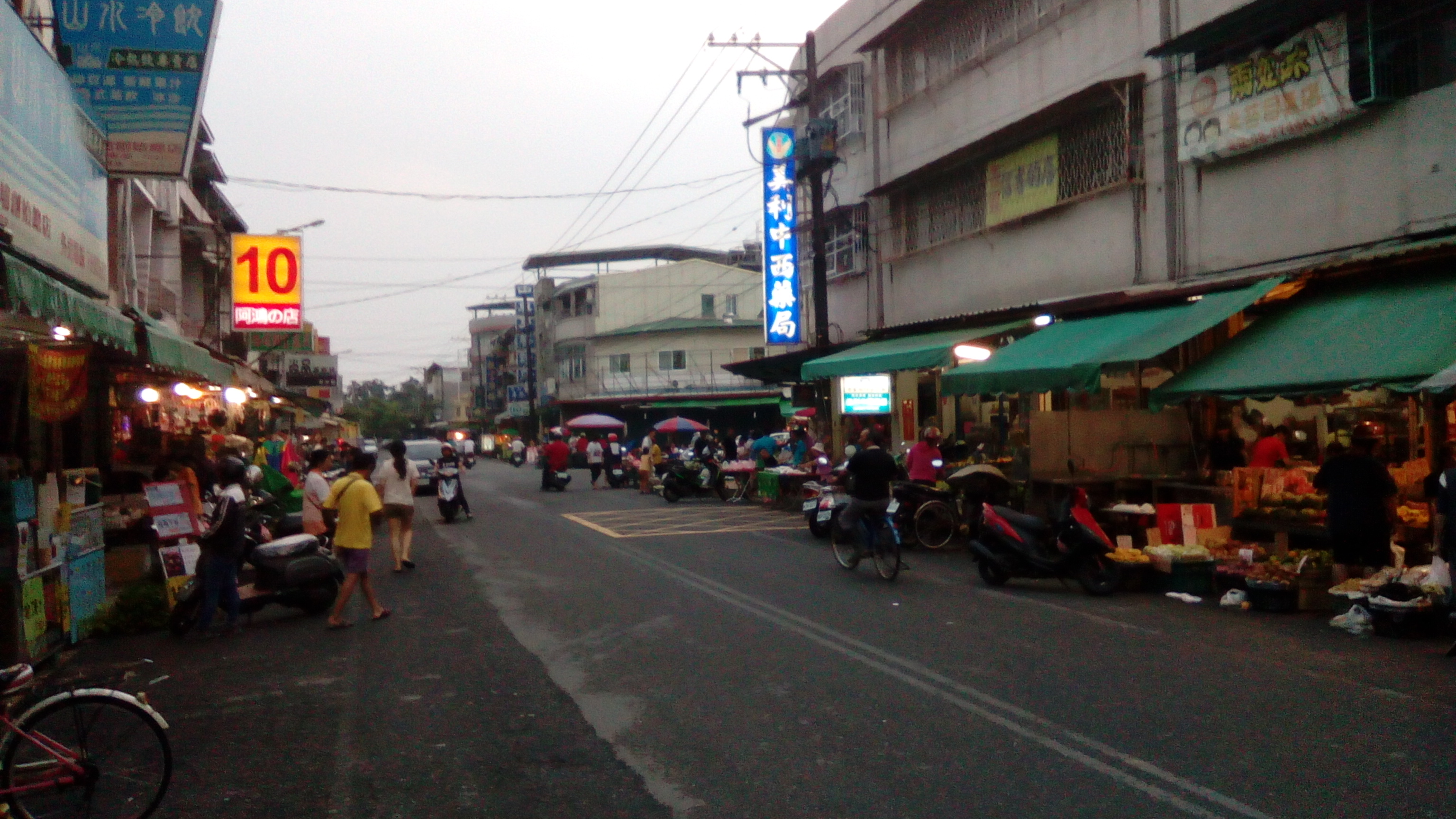 此圖位於內埔鄉中興路(市區) 指的並非鐵皮屋加蓋的黃昏市場 而是路上擺設的攤位 黃昏一到店家會在固定的定點營業